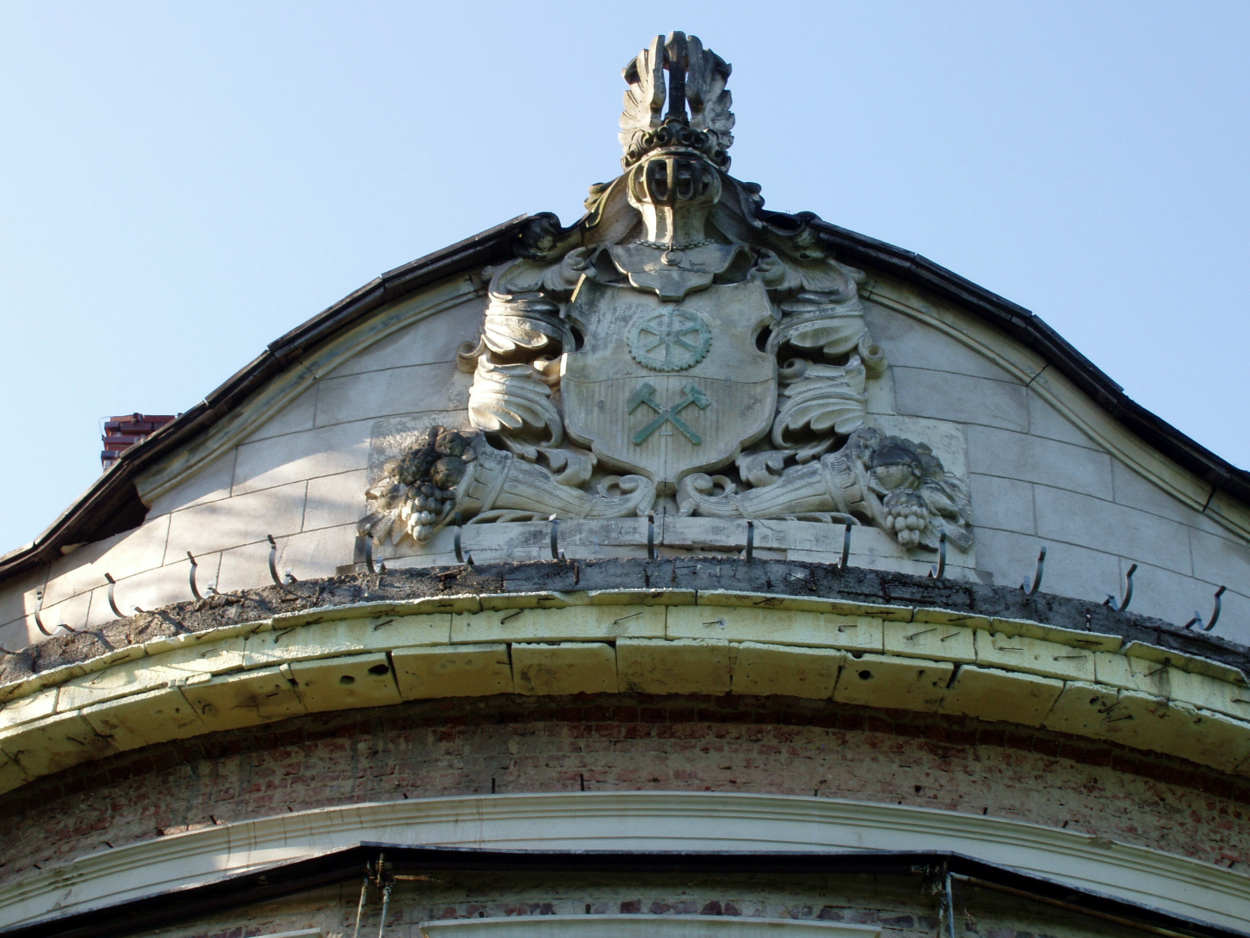 Maciejowiec, pałac, 1834-1838, 1914